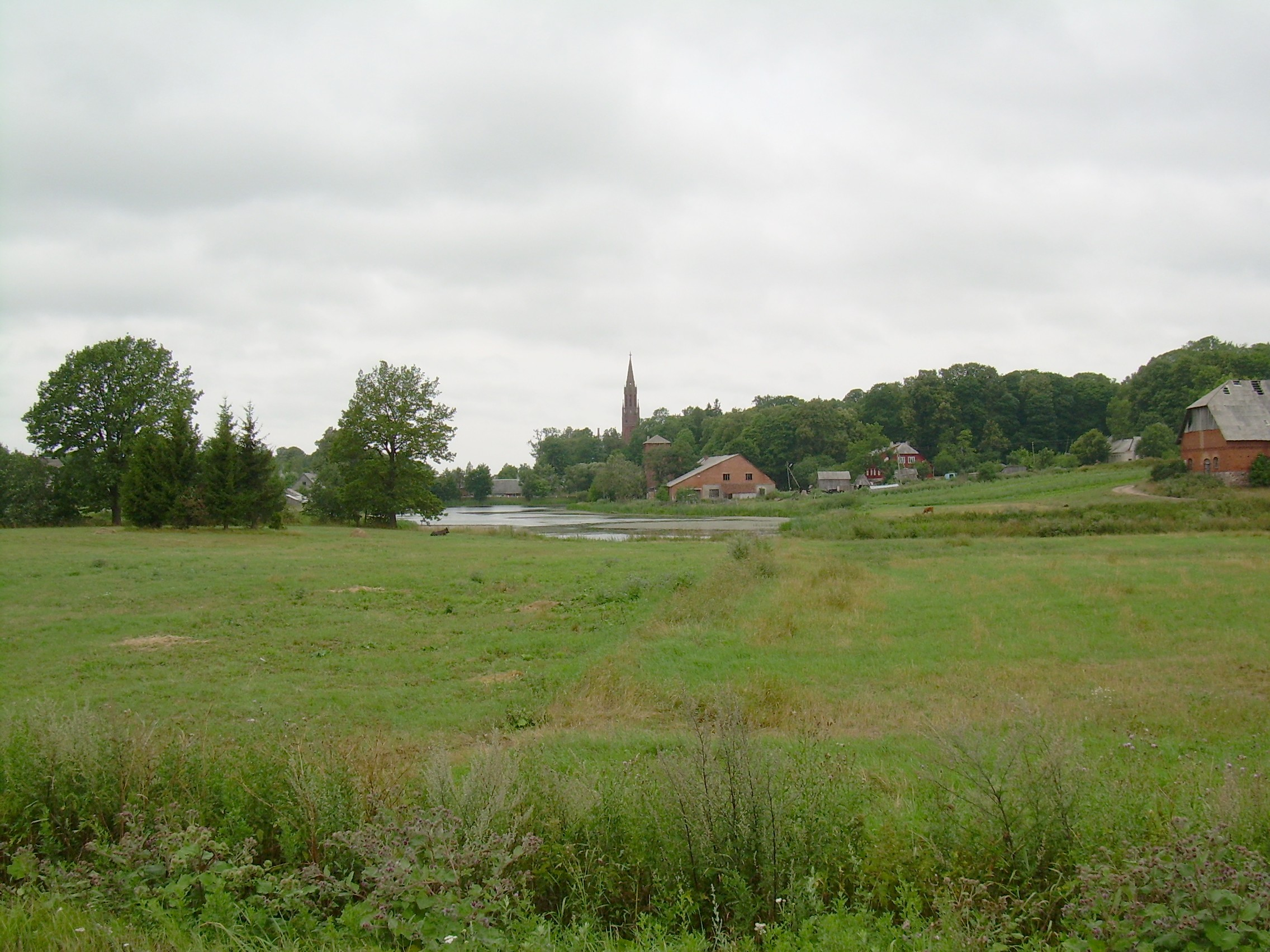 Šateikių Šv. evangelisto Morkaus bažnyčia